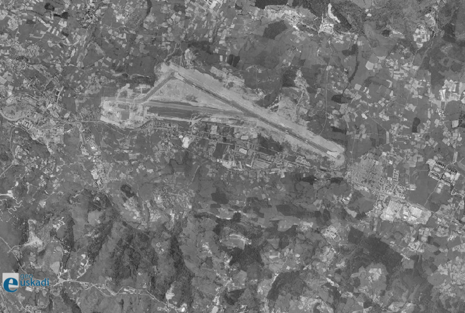 Bilboko aireportuaren ortoargazkia